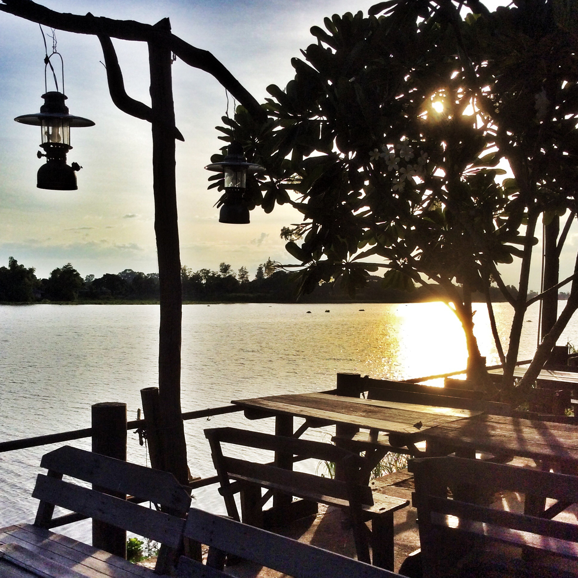 Ban Kluai, Mueang Chai Nat District, Chai Nat, Thailand